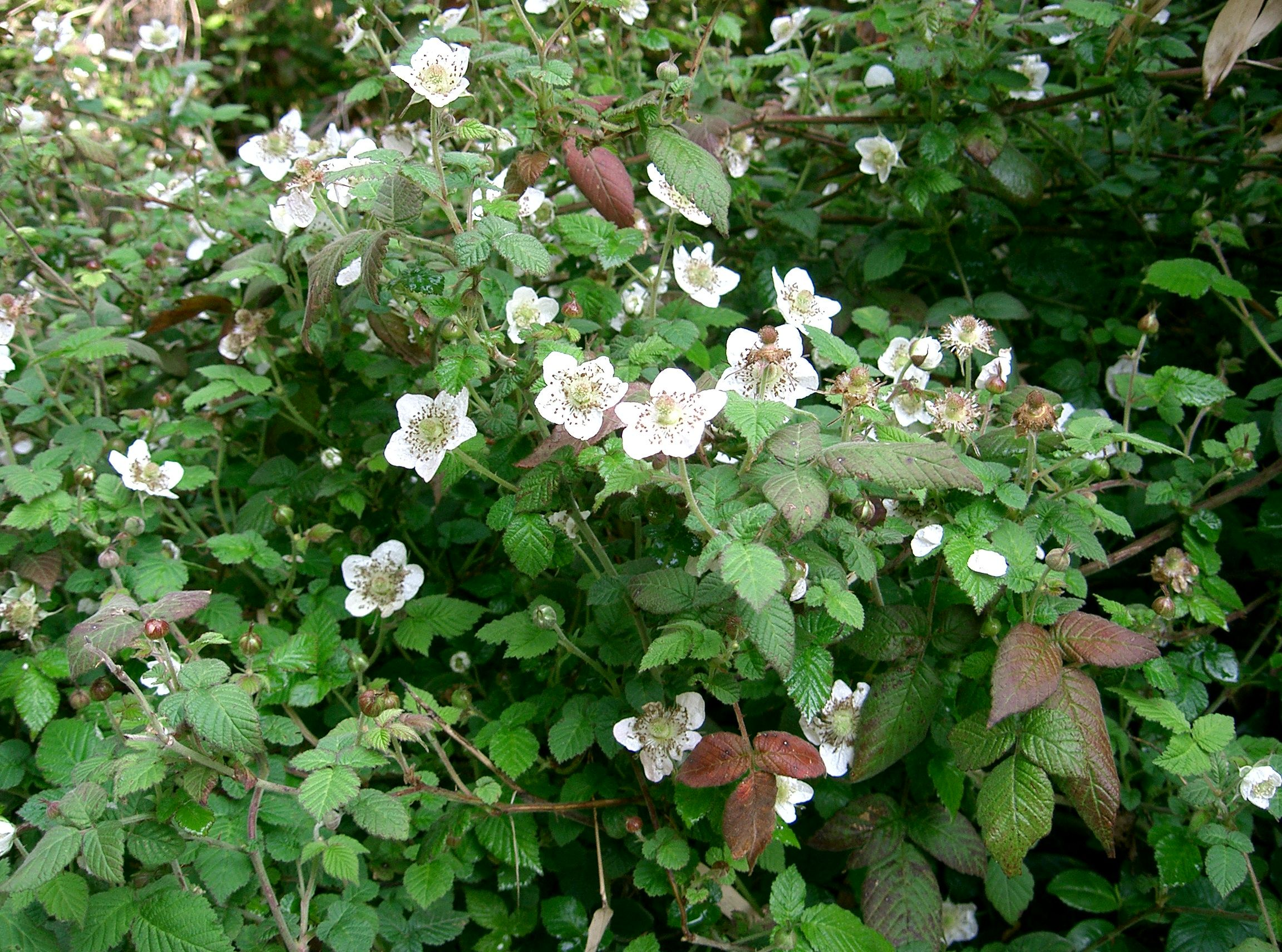 Rubus hirsutus